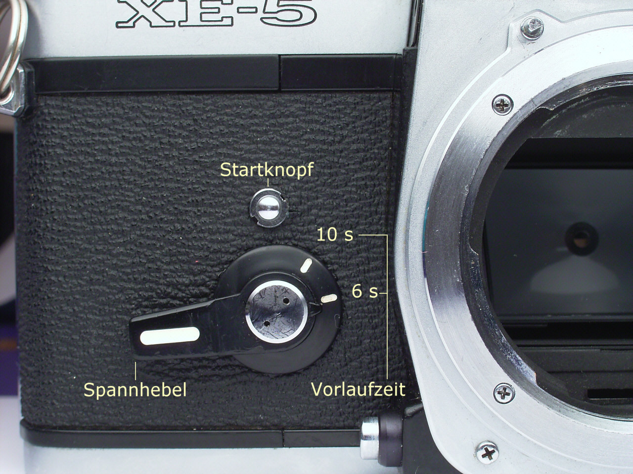 Mechanischer Selbstauslöser einer Spiegelreflexkamera (Minolta XE-5), eingestellt auf sechs Sekunden Vorlaufzeit. Die obere Markierung gilt für 10 Sekunden Vorlaufzeit.